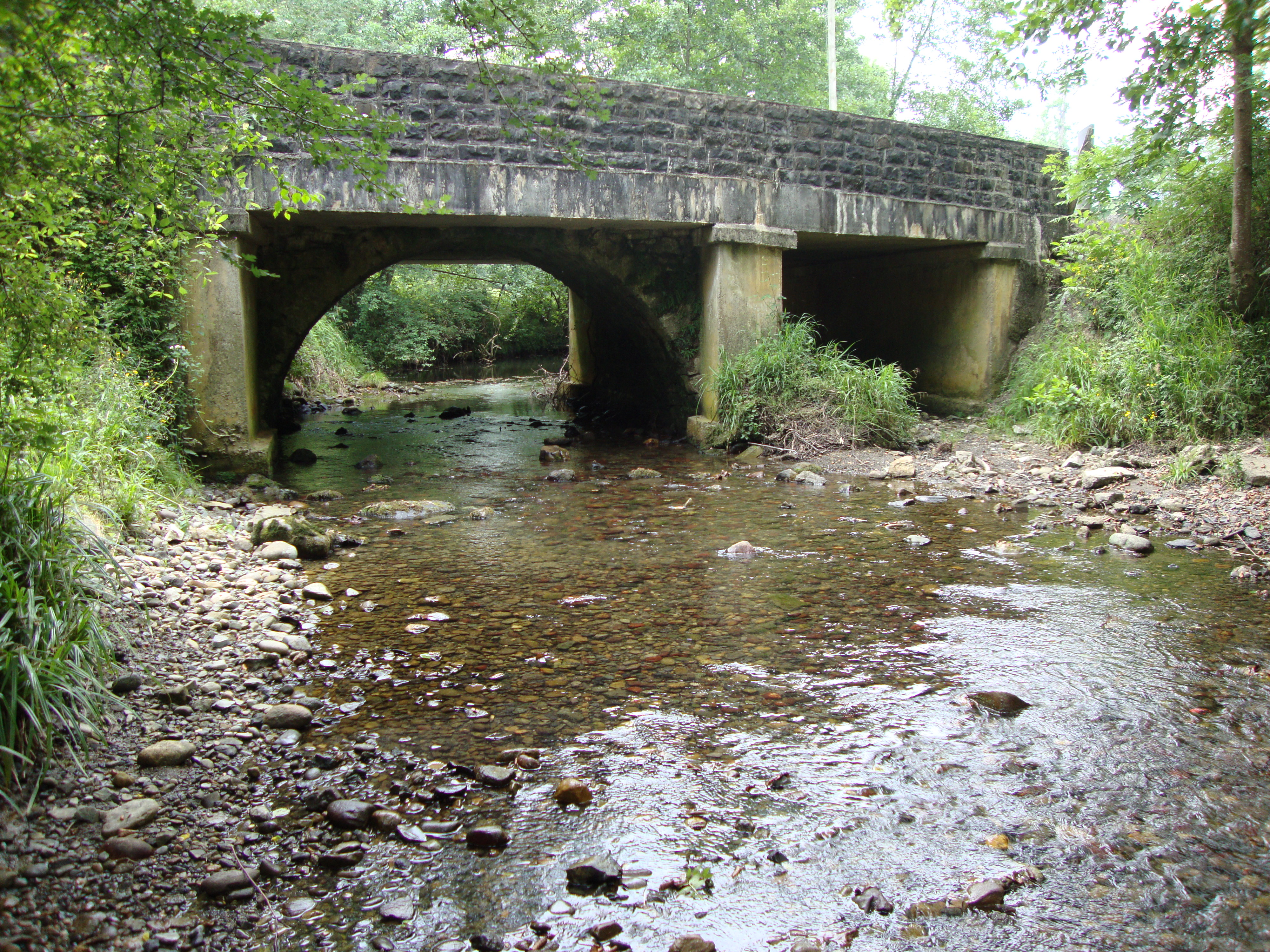 Bidartéa (Idaux-Mendy, Pyr-Atl, Fr) Apouhoura river.